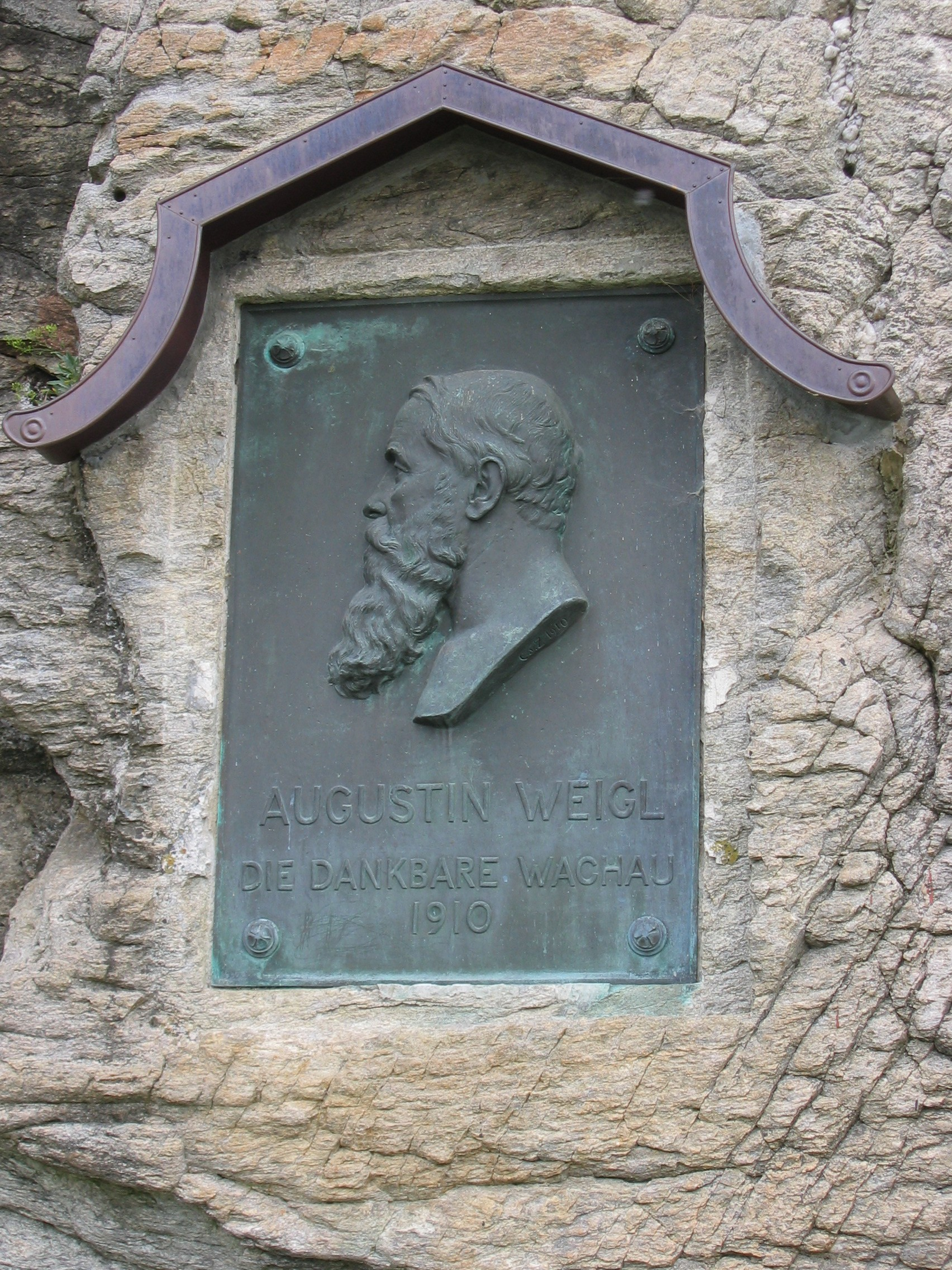 Gedenkplakette für Augustin Weigl Promenade Dürnstein